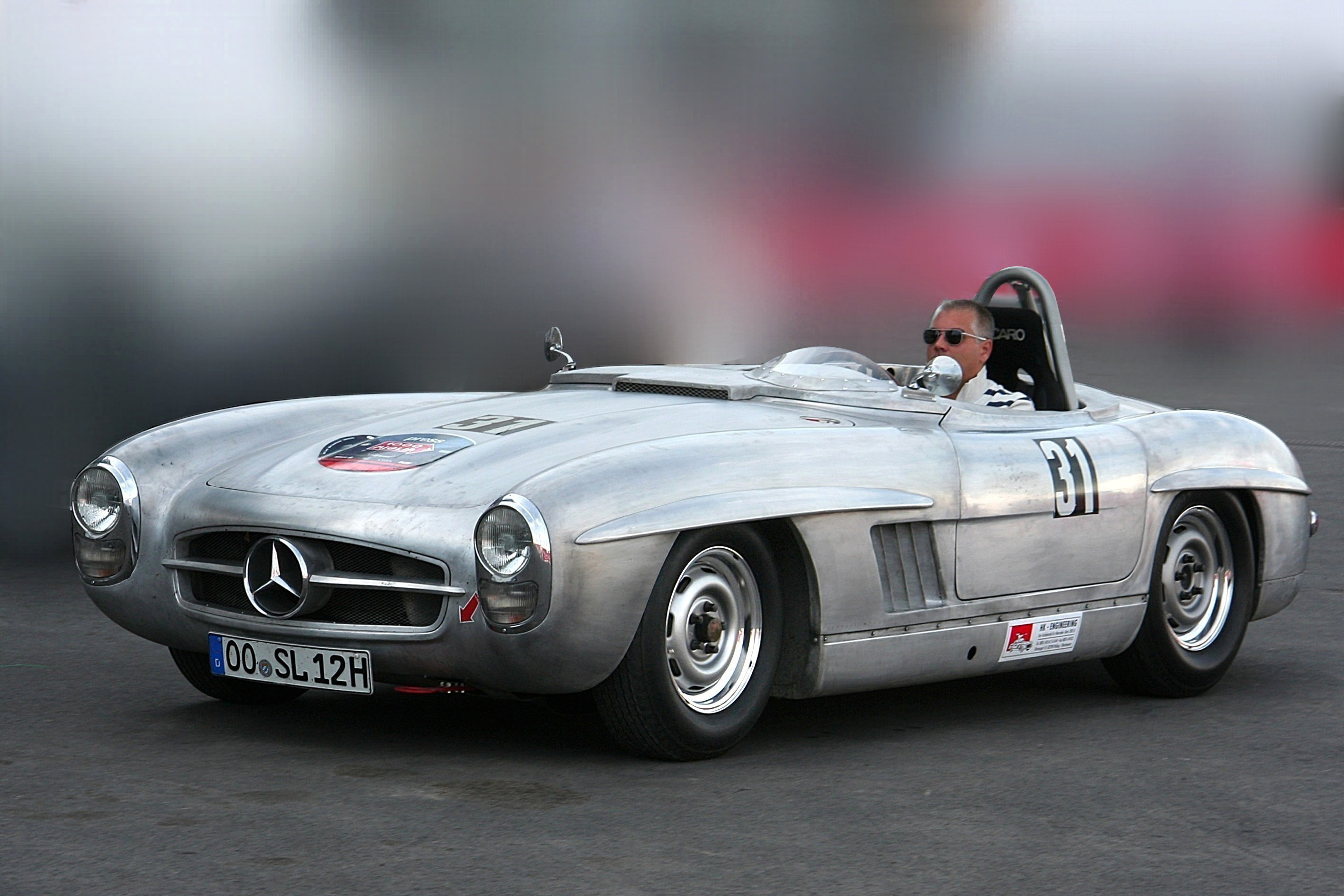 Mercedes-Benz SL Roadster, Baujahr 1957, umgebaut zum SLS, beim Oldtimer-Grand-Prix des AvD 2009; amtliches Kennzeichen verändert